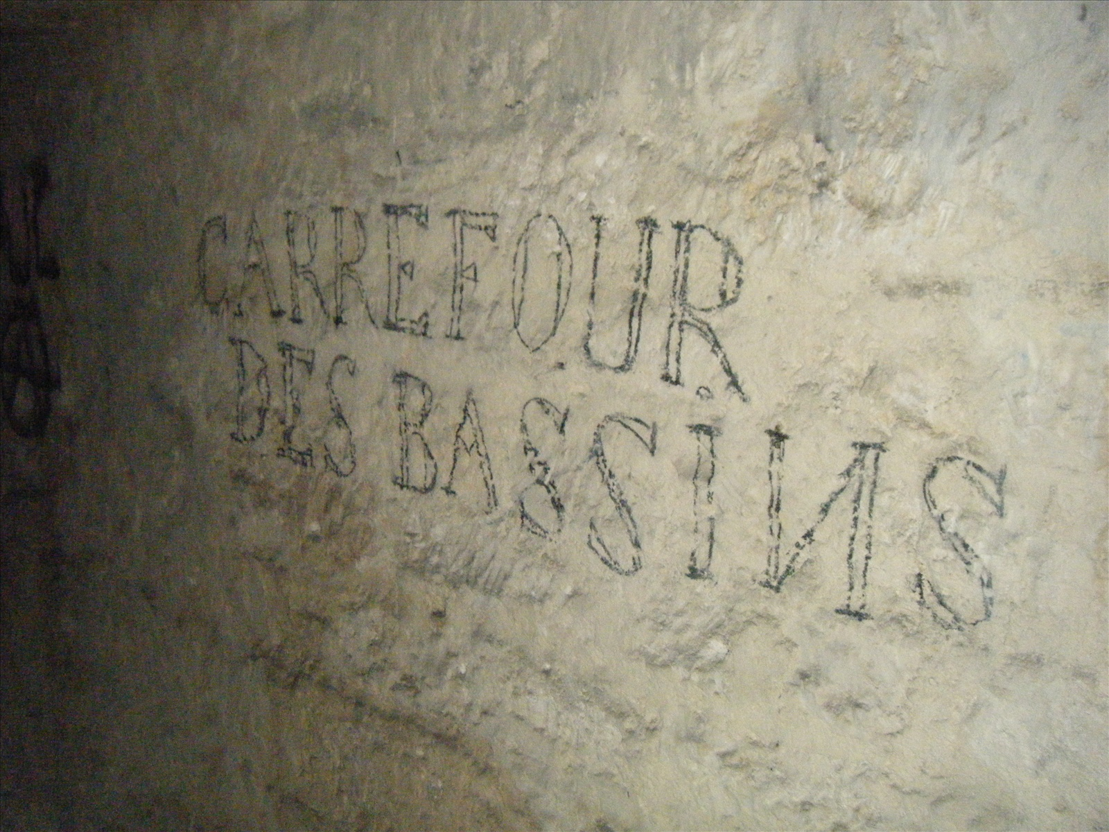 Commémoration de l’existence du réservoir d'eau sous la rue Freycinet.